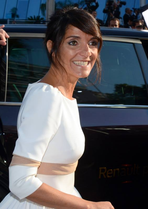 Florence Foresti au festival de Cannes